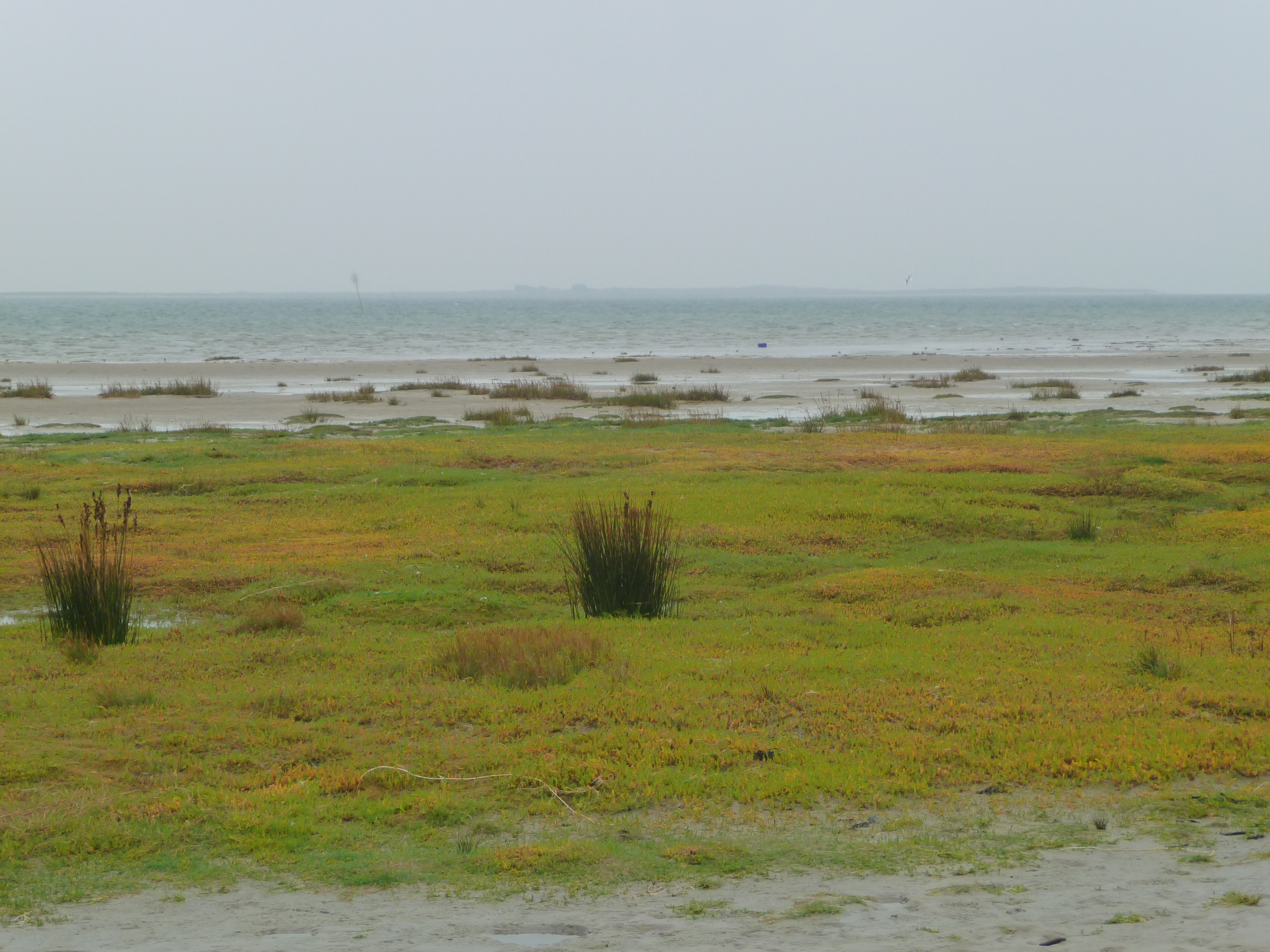 Strandmilchkraut (Glaux maritima) und Meerstrandbinse (Juncus maritimus) am Strand der ostfriesischen Nordseeinsel Juist (Niedersachsen, Deutschland)